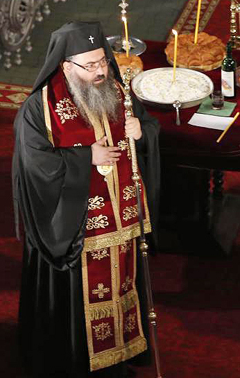 Митрополит Варненский и Великопреславский Иоанн (Иванов) в Успенском соборе в Варне